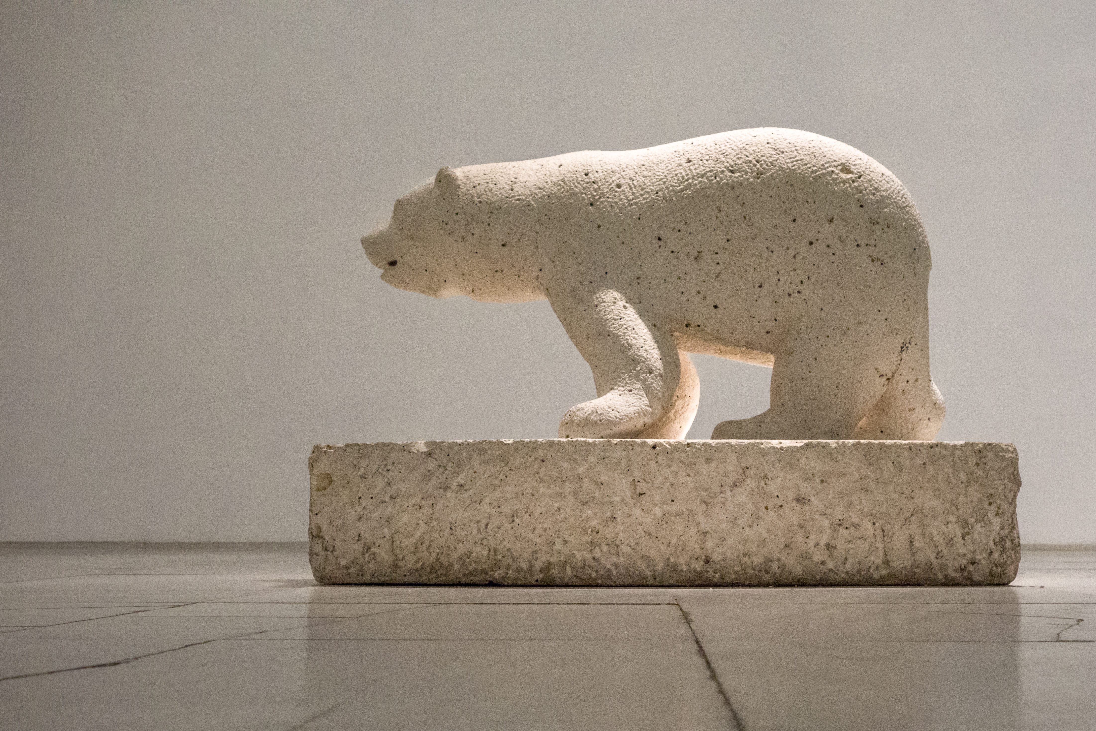 Oso Polar